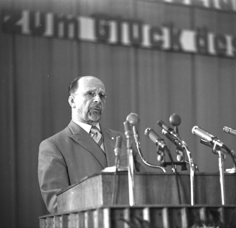 Zentralbild/Junge 25.8.1961 Berlin: Machtvolle Kundgebung mit Walter Ulbricht in der Hauptstadt. - "Wie geht es weiter in Berlin?" Auf diese Frage gab der Erste Sekretär des ZK der SED und Vorsitzende des Staatsrates der DDR, Walter Ulbricht, am 25.8. die von Millionen Bürgern der Hauptstadt und der DDR mit brennendem Interesse erwartete Antwort. Tausende Berliner Werktätige, die sich seit der Verkündung der Schutzmaßnahmen der DDR in hervorragender Weise bewährten, waren dem Aufruf der Berliner Bezirksleitung der SED und dem Berliner Ausschuss der Nationalen Front zu einer großen Wahlkundgebung in die Sporthalle Stalinallee gefolgt. Prof. Stanek eröffente die bedeutsame Wahlkundgebung und gab Walter Ulbricht, der mit Hochrufen empfangen worden war, das Wort. U.B.z: Walter Ulbricht spricht zu den Berlinern.